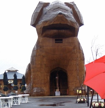 巨大な木造オブジェ